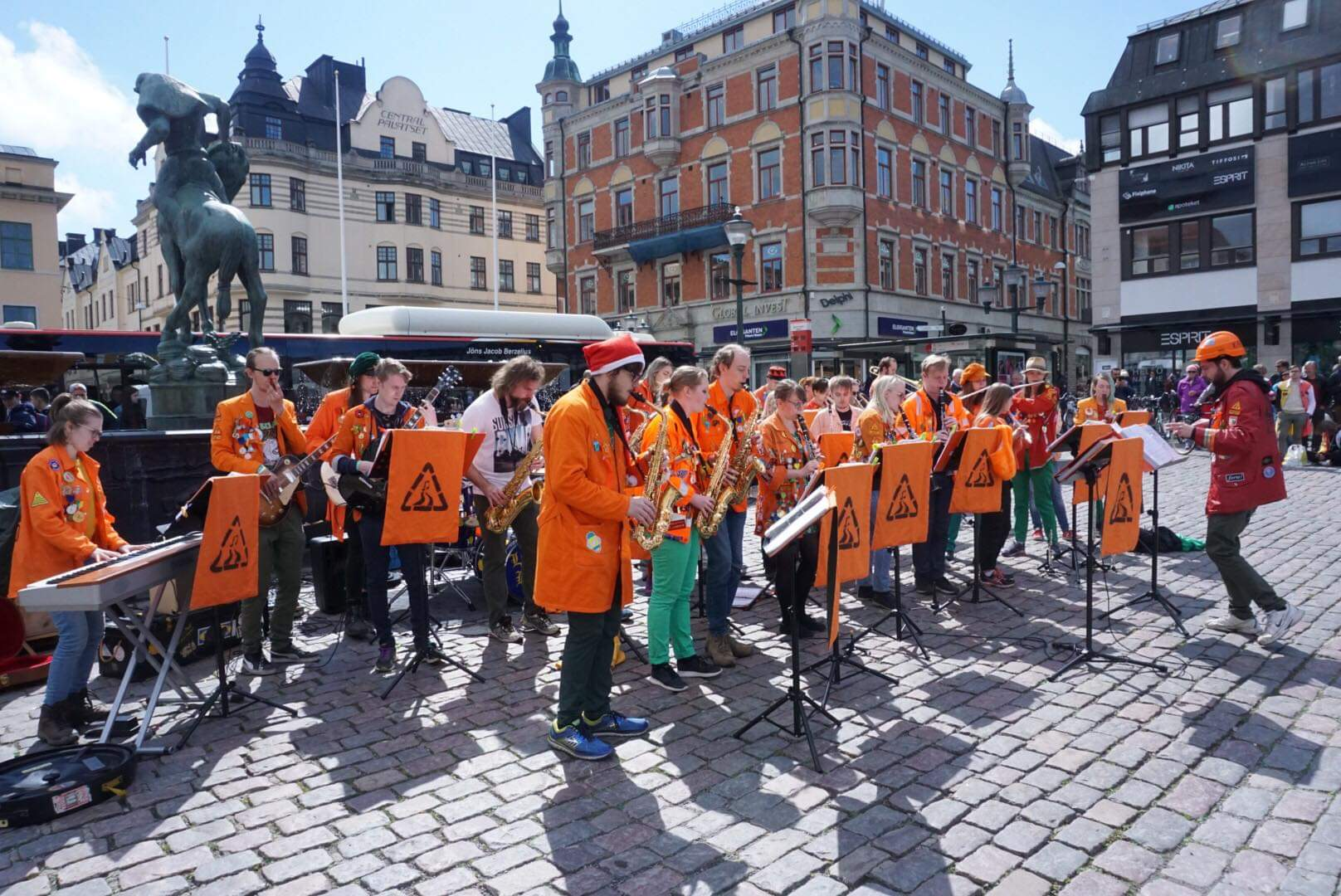 Studentorkestern Snösvänget spelar i Linköpng under studentorkesterfestivalen SOF, 2019.